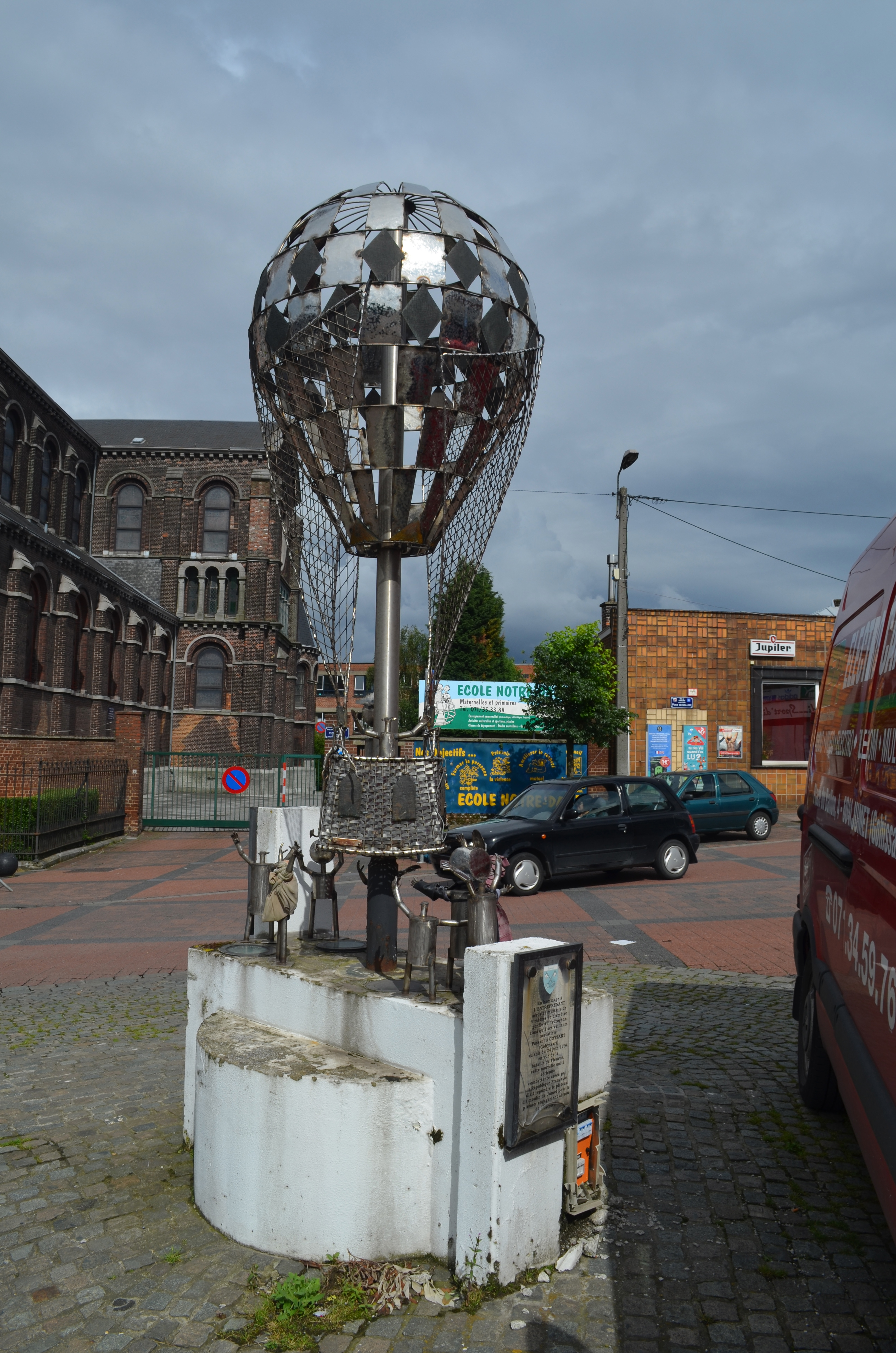 Jumet (Charleroi) - La ballon de l'an II - Sculpture en acier inoxydable de Giuseppe Miggiano